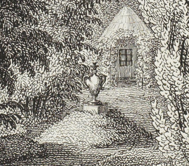 Hirschfelddenkmal